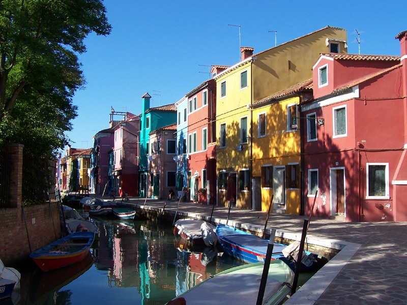 Burano - Fondamenta Terranova